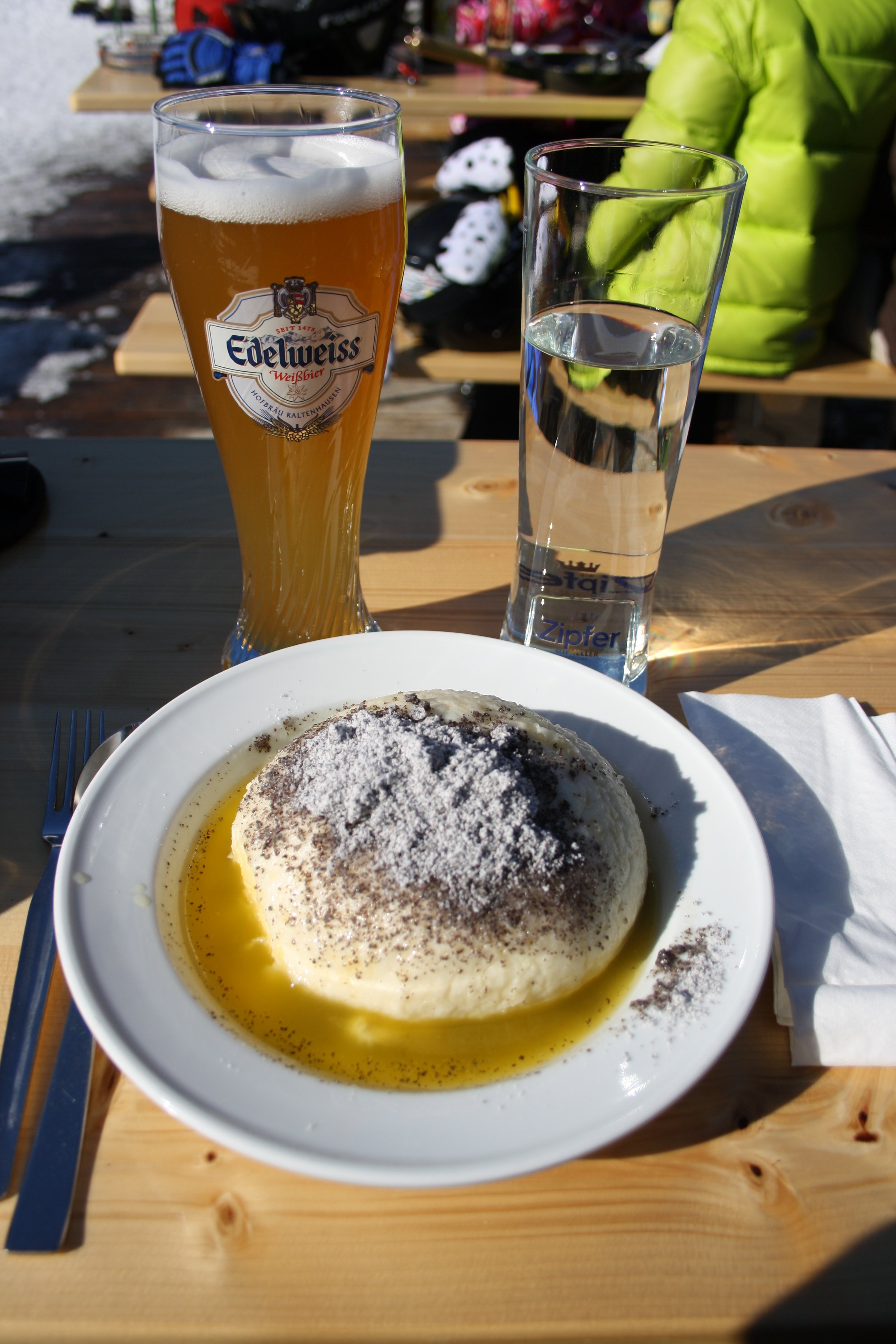 Schneeberg